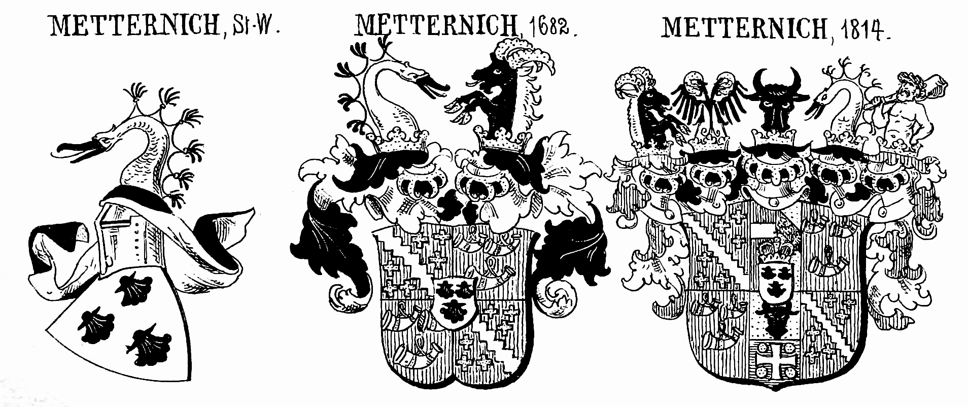 Wappen derer von Metternich in Neues Siebmacher Wappenbuch, 1899